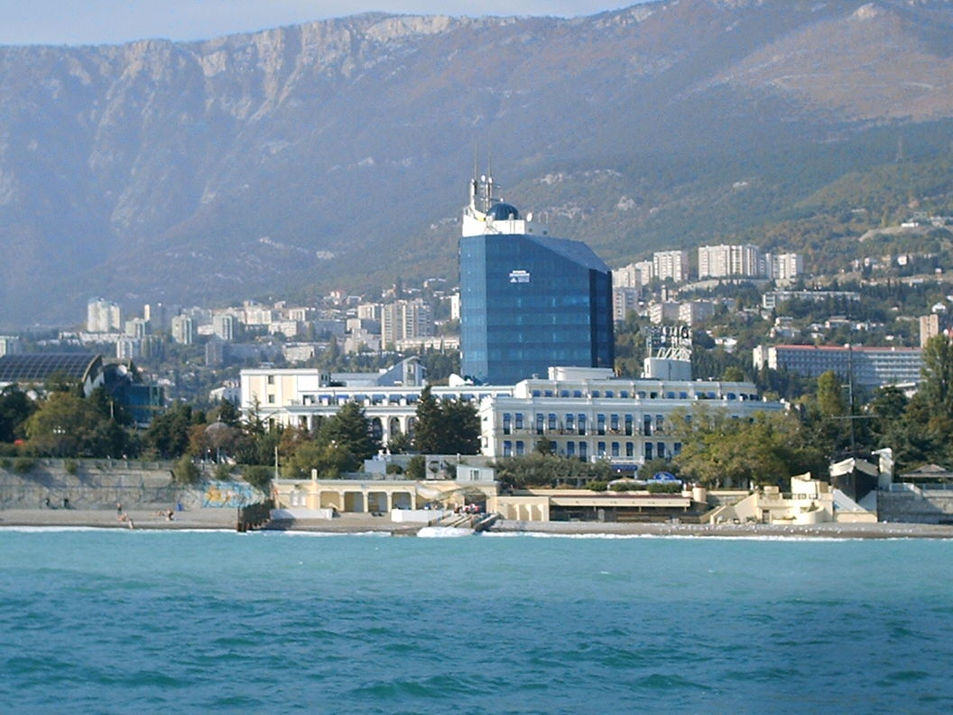 Вид на набережную Ялты с моряГостиница Ореанда и современный офисный центр